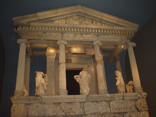 Nereid Monument, British Museum